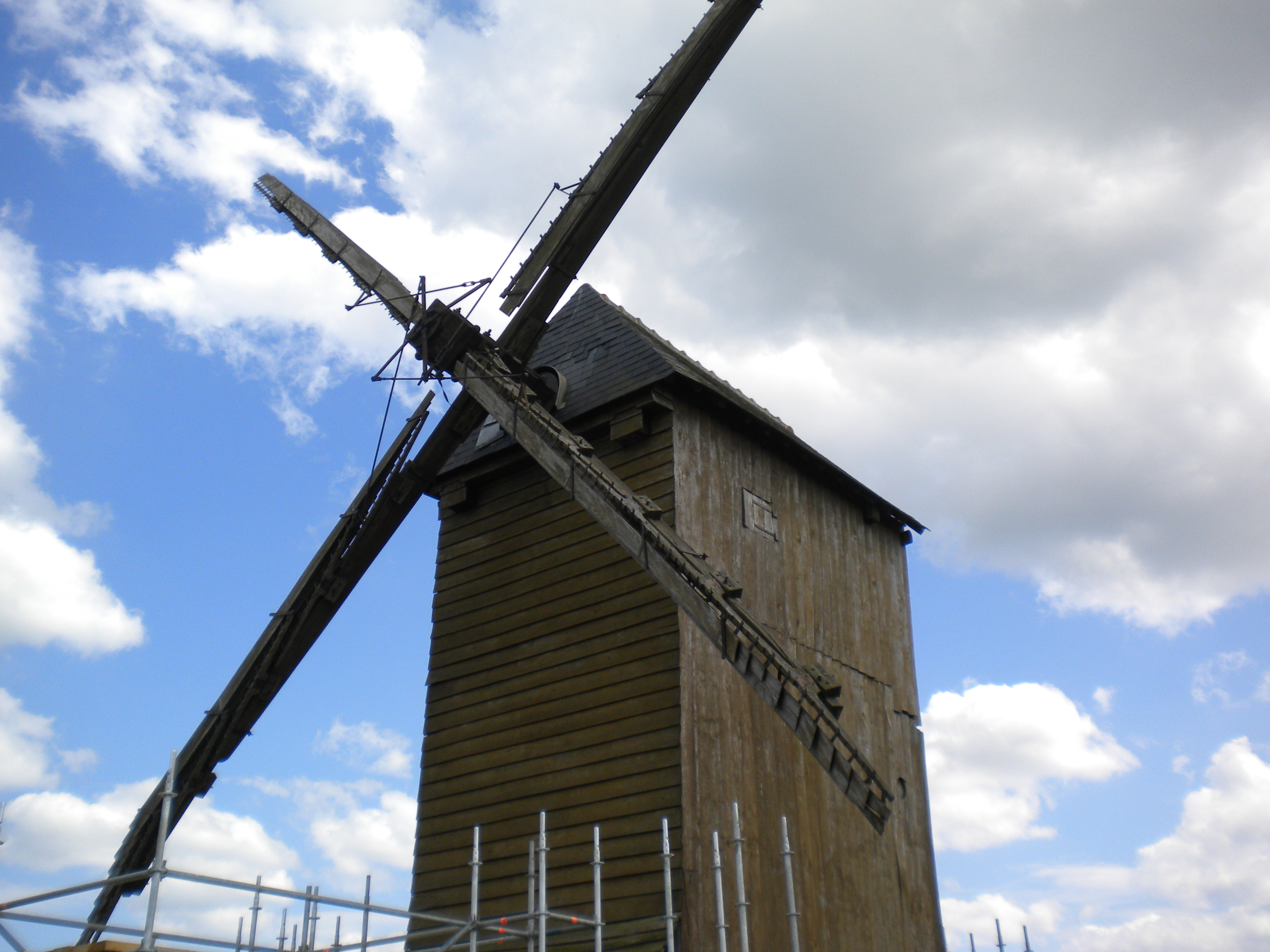 Le moulin Gaillardin de Chapelon, datant du XVe siècle.